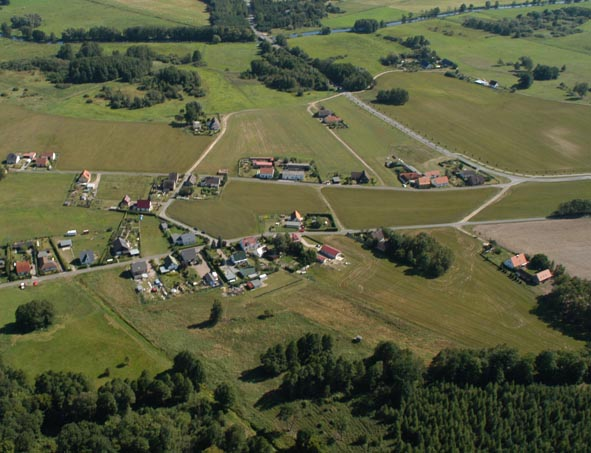 Torgelow-Holländerei aus der Vogelperspektive